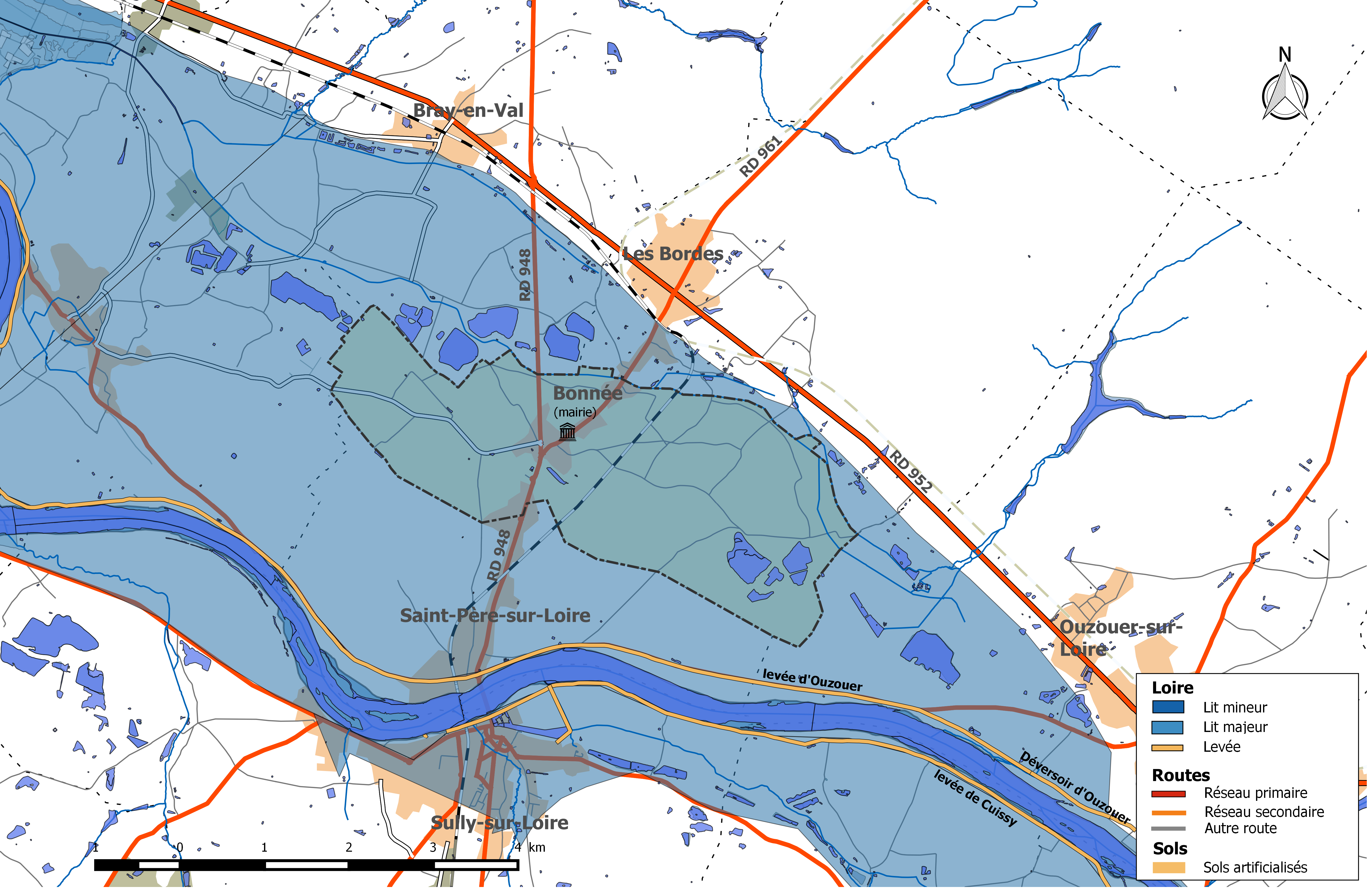 Zone inondable et réseaux hydrographique et routier de la commune de Bonnée.